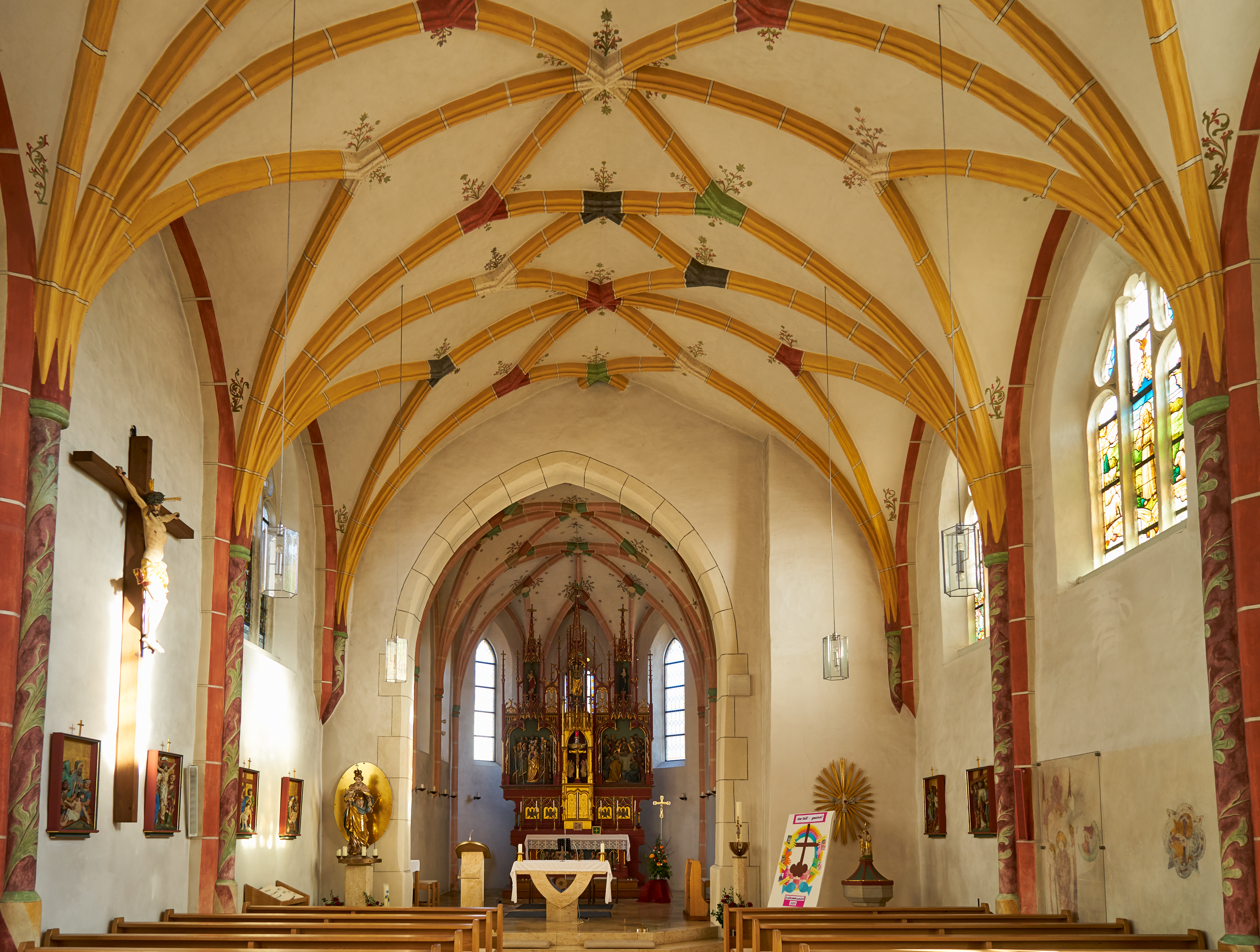 Katholische Pfarrkirche St. Michael, Saalkirche mit eingezogenem Polygonalchor, Chorflankenturm, Vorzeichen und zweigeschossiger Sakristei unter Schleppdach, die nordöstliche Langseite mit Strebepfeilern, spätgotisch, Mitte 15. Jahrhundert, unter Verwendung des älteren Turms, Turmobergeschoss 1754; mit Ausstattung.